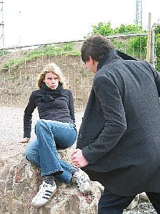 Exhibitionistische Szene (nachgestellt)